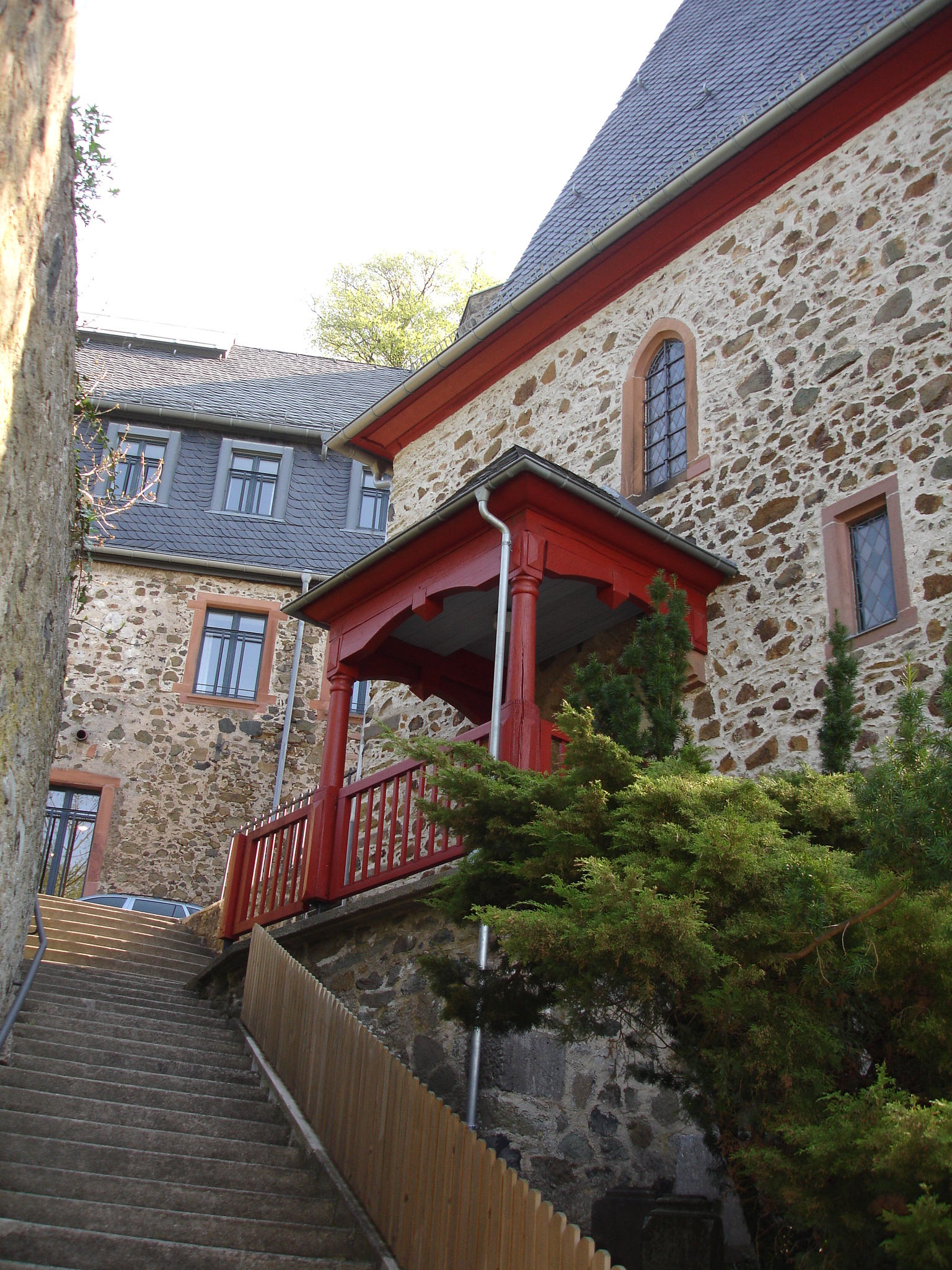 Kirchtreppe mit Eingangsvorbau der Kirche in Hohensolms